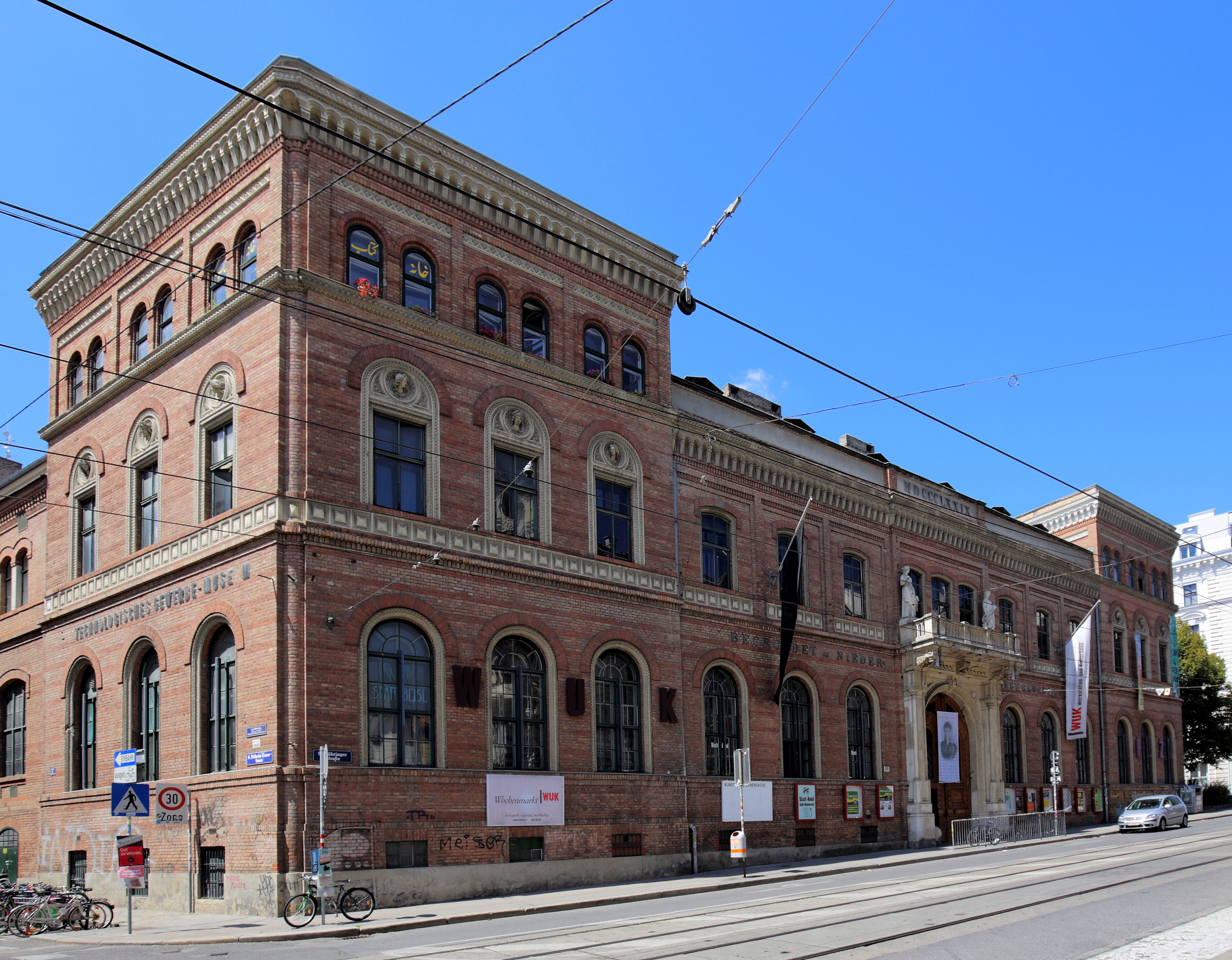 Das Gebäude an der Adresse Währinger Straße 69 im 9. Bezirk der österreichischen Bundeshauptstadt Wien. Dieses Gebäude ließ Georg Sigl 1866 von Carl Tietz als Wohn-, Büro- und Fabriksgebäude errichten. In der Folge des Börsenkrachs 1873 musste er Teile des Gebäudes untervermieten und daher zog Mitte der 1880er Jahre das Technologische Gewerbemuseum (TGM) ein. Dieses wurde im Jahre 1879 von Wilhelm Exner unter der Schirmherrschaft des damaligen Niederösterreichischen Gewerbevereins nach dem Vorbild des „Conservatoire des arts et métiers“ gegründet. Die Zielsetzung des Gründers war, eine Stätte der Weiterbildung für den Bereich der Technologie zur Verfügung zu stellen. Im Jahr 1905 übernahm der Bund das TGM, da der Gewerbeverein den Unterhalt der Ausbildungsstätte nicht mehr finanzieren konnte. 1933 wurde die umfangreiche technische Sammlung des TGM in das Technische Museum übersiedelt. Nach dem Neubau des TGM im 20. Wiener Gemeindebezirk Brigittenau zog dieses in den Jahren 1979/80 um. 1981 wurde das Gebäude vom "Verein zur Schaffung offener Kultur- und Werkstättenhäuser" in einer "sanften Besetzung" in Beschlag genommen. Heute ist es ein selbstverwaltetes Werkstätten- und Kulturhaus für weit über 100 Gruppen und wird unter WUK (Werkstätten- und Kulturhaus) geführt.